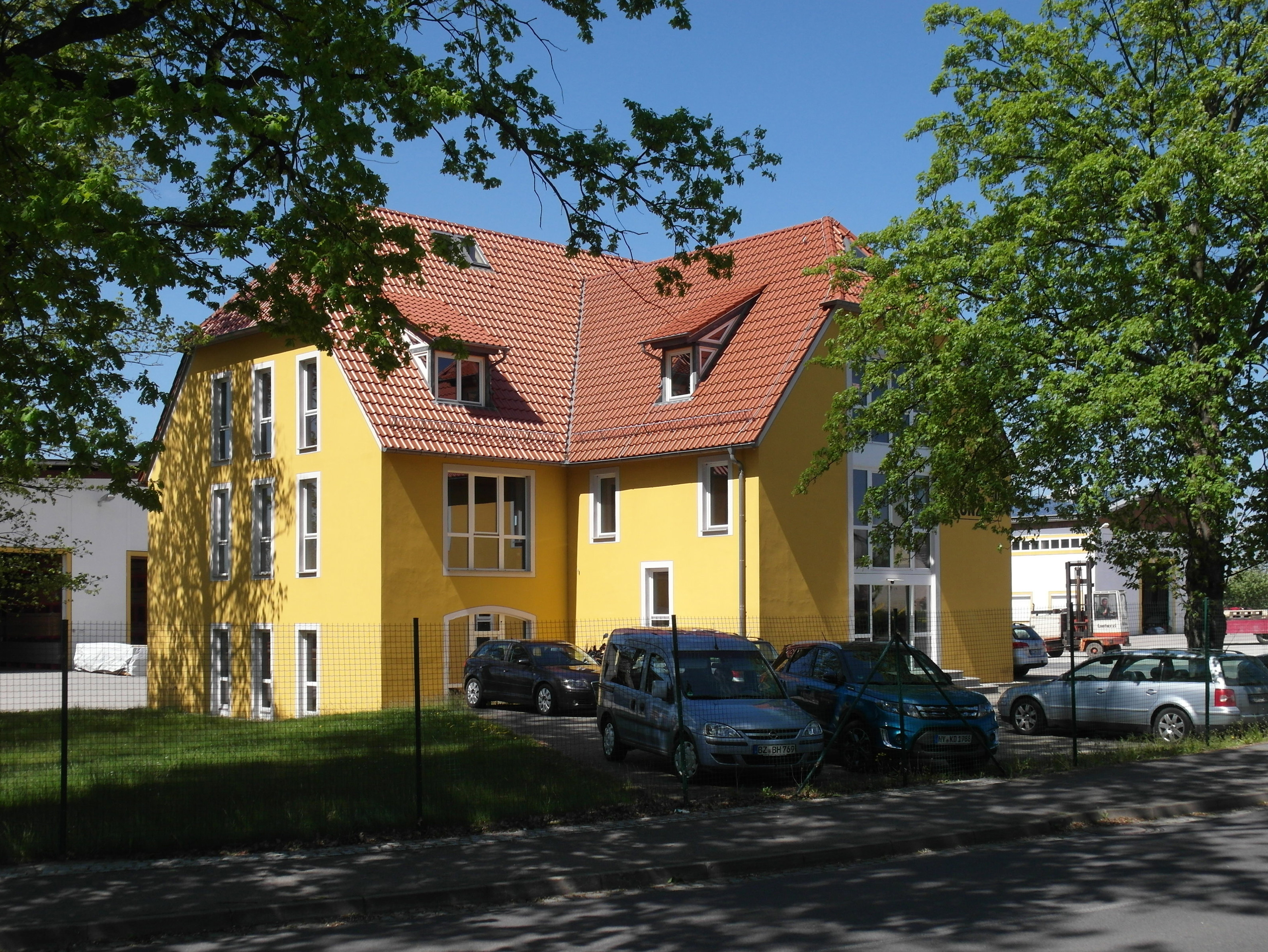 09.05.2016 02994 Straßgräbchen (Gemeinde Bernsdorf): Das gelbe Firmengebäude der Holz Kunze GmbH ist das einstige Herrenhaus. Der Inhaber Lutz Kunze hat es nach 1992 zu seinem Firmensitz ausgebaut. Es wird vermutet, daß Graf Cosel den heutigen Bau im 18. Jh. auf älterer Grundlage errichten ließ. Ab 1920 gehörte es der Stadt Kamenz, die es verpachtete. In der DDR wurde es 1950 ein Volkseigenes Gut. Im Haus wohnten Lehrlinge aus der Tierzucht. Heute befinden sich auf dem einstigen Gutsgelände große Holzlagerhallen. [SAM5813.JPG]20150509510DR.JPG(c)Blobelt